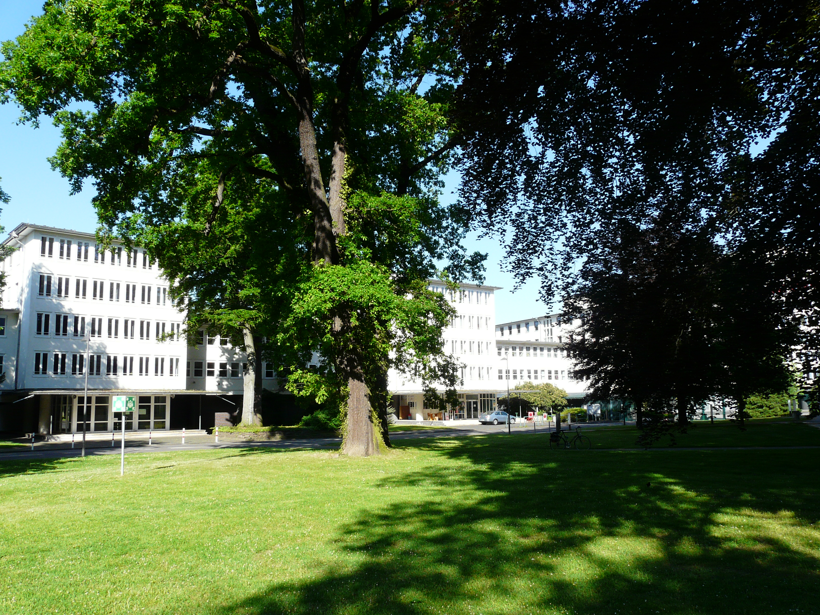 Dienstsitz des Gemeinsamen Ausschusses Elektronik im Bauwesen (GAEB) in der Deichmannsaue in Bonn-Rüngsdorf